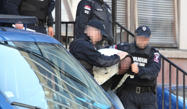 Hapsenje maloletnika